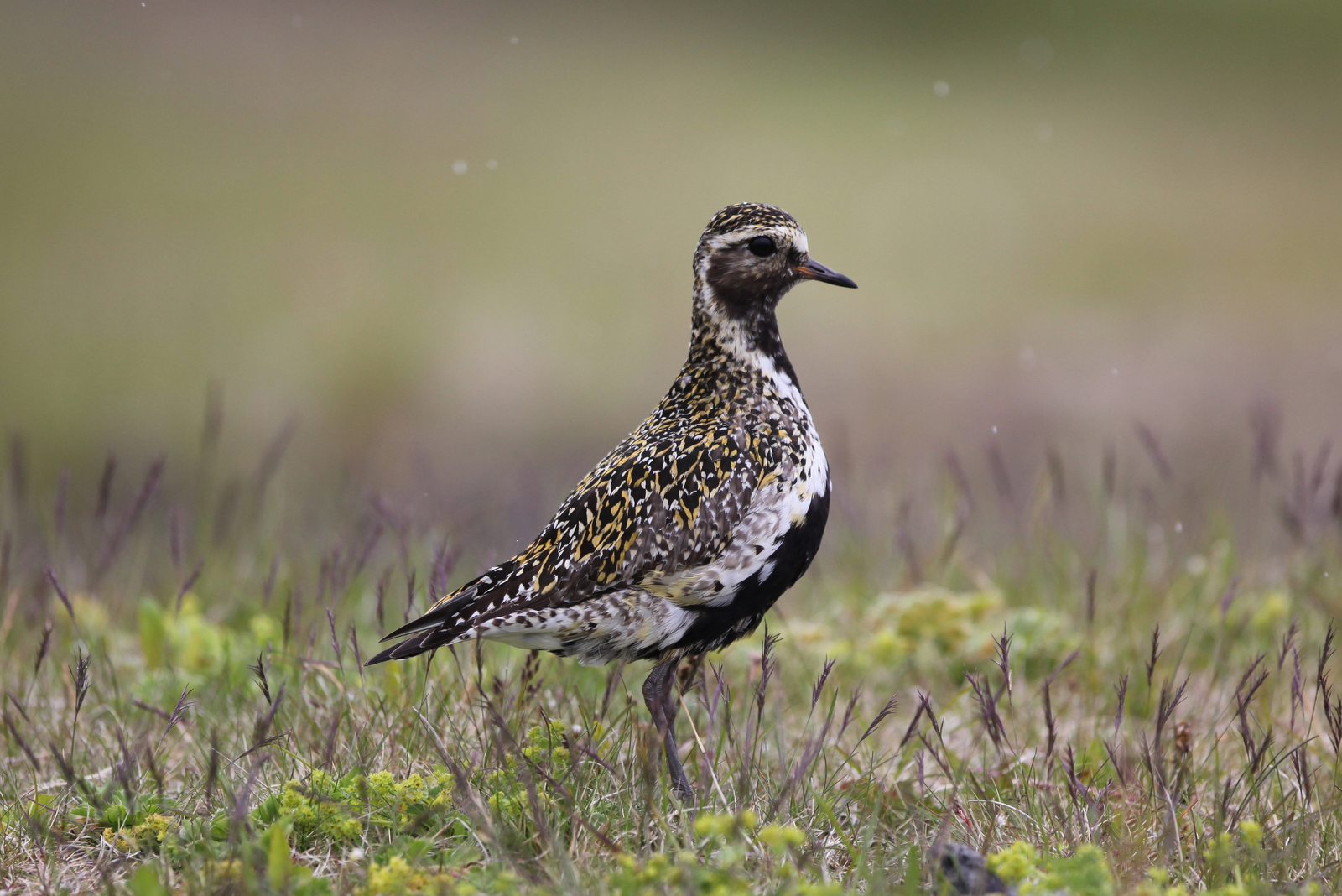 Heiðlóa